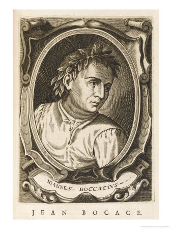 Giovanni Boccaccio